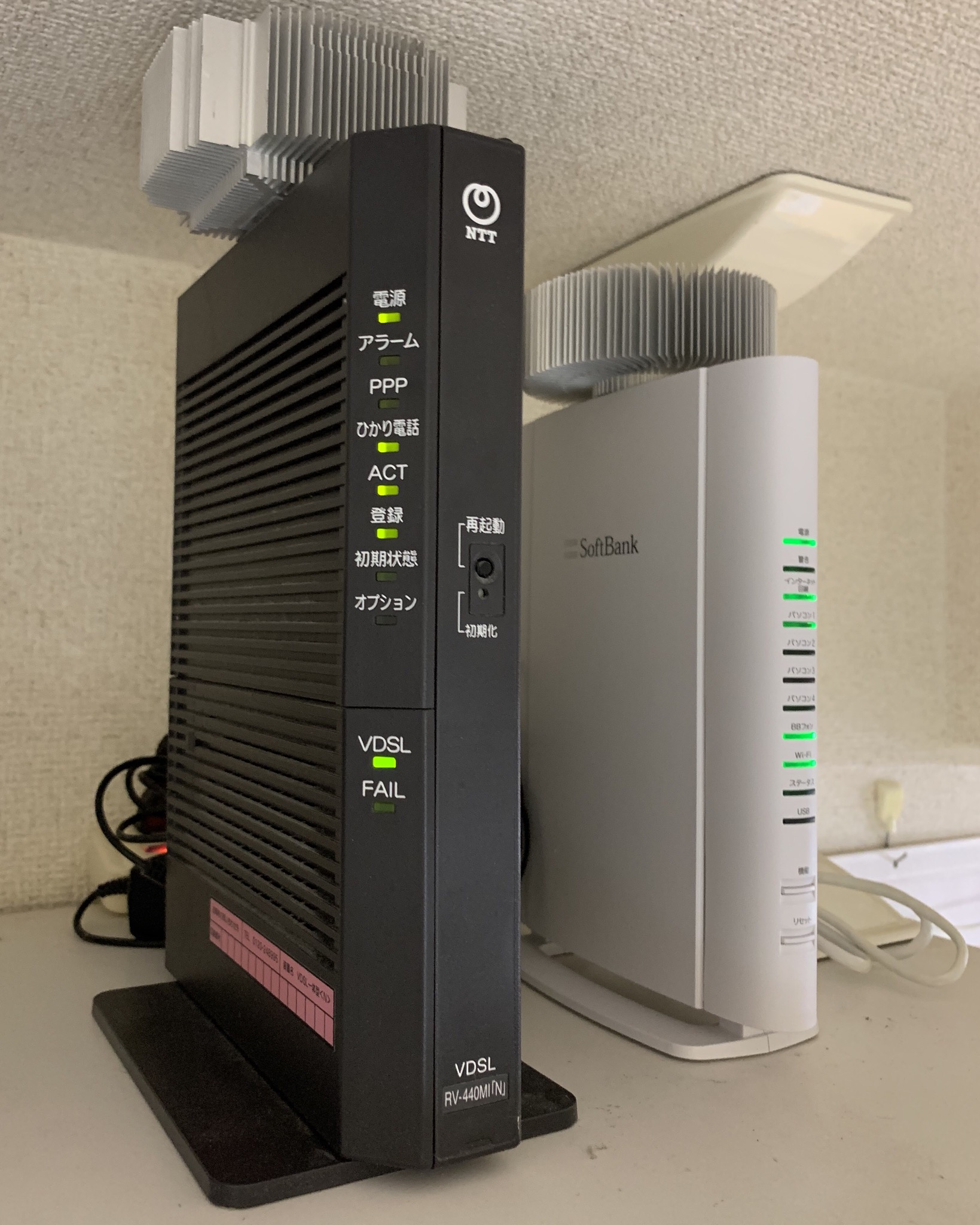 VDSL装置と光BBユニット